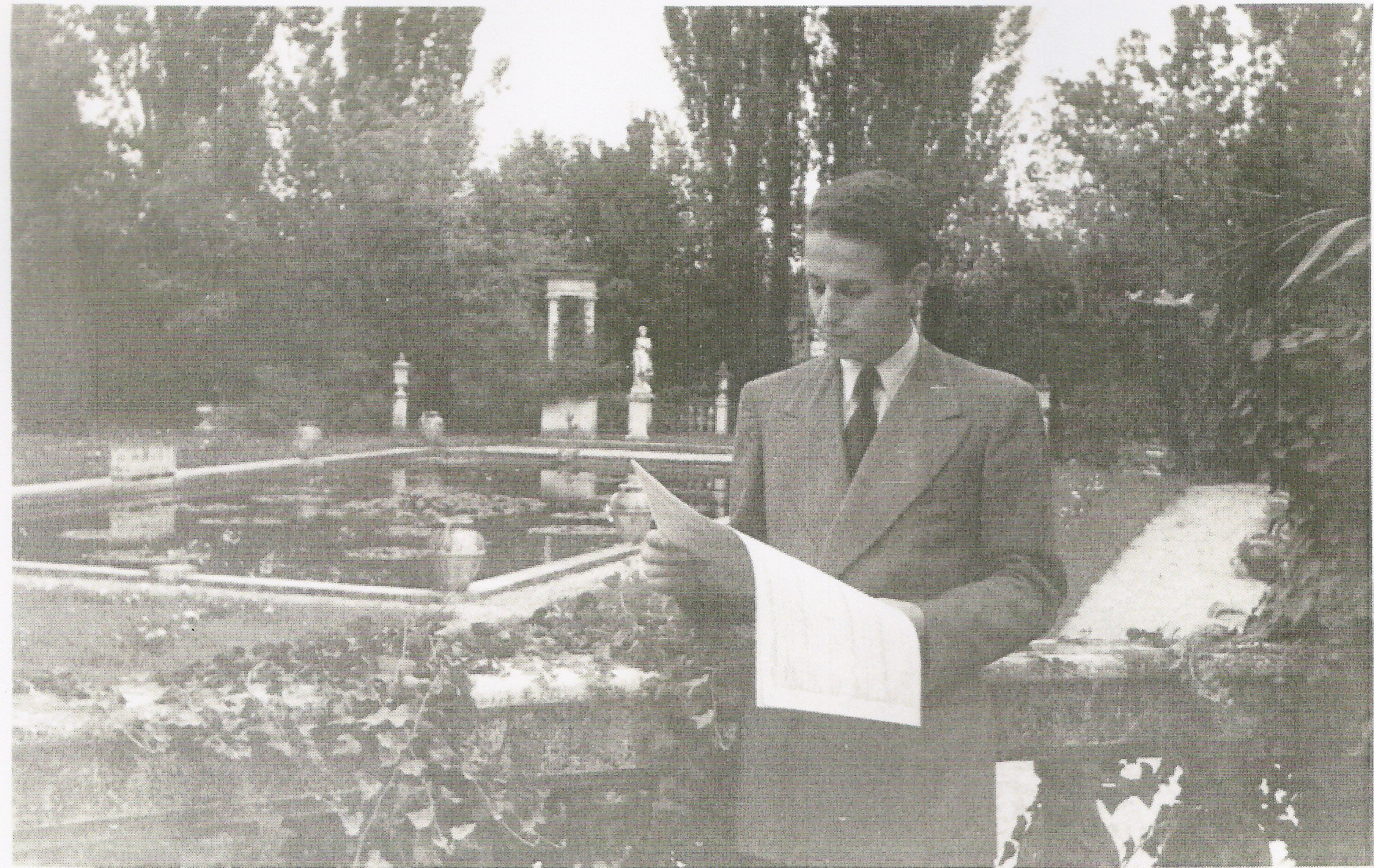 Antonio Fanna a Villa delle Rose